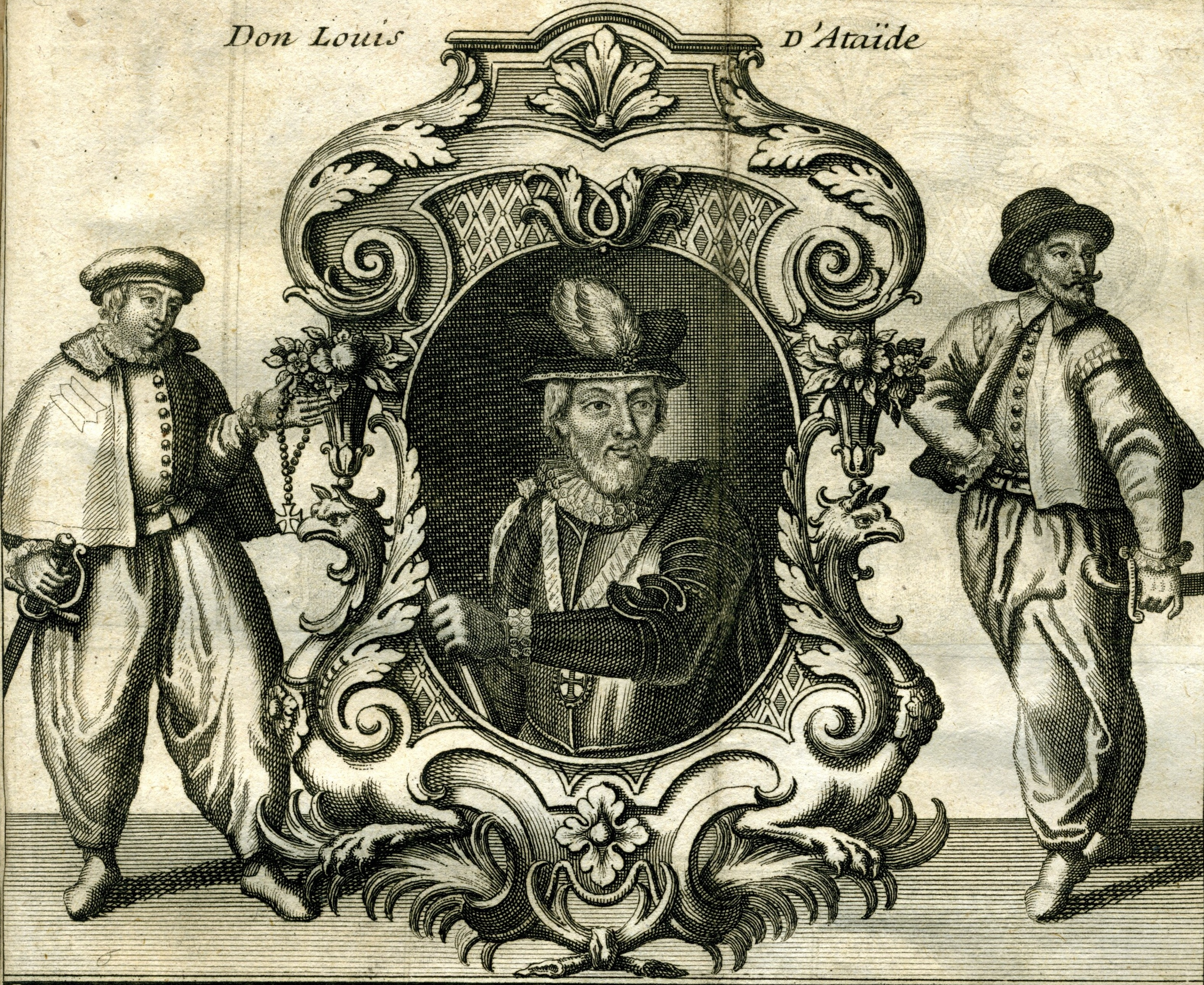 Portrait des Dom Luís de Ataíde, Vizekönig von Portugiesisch-Indien, 1736